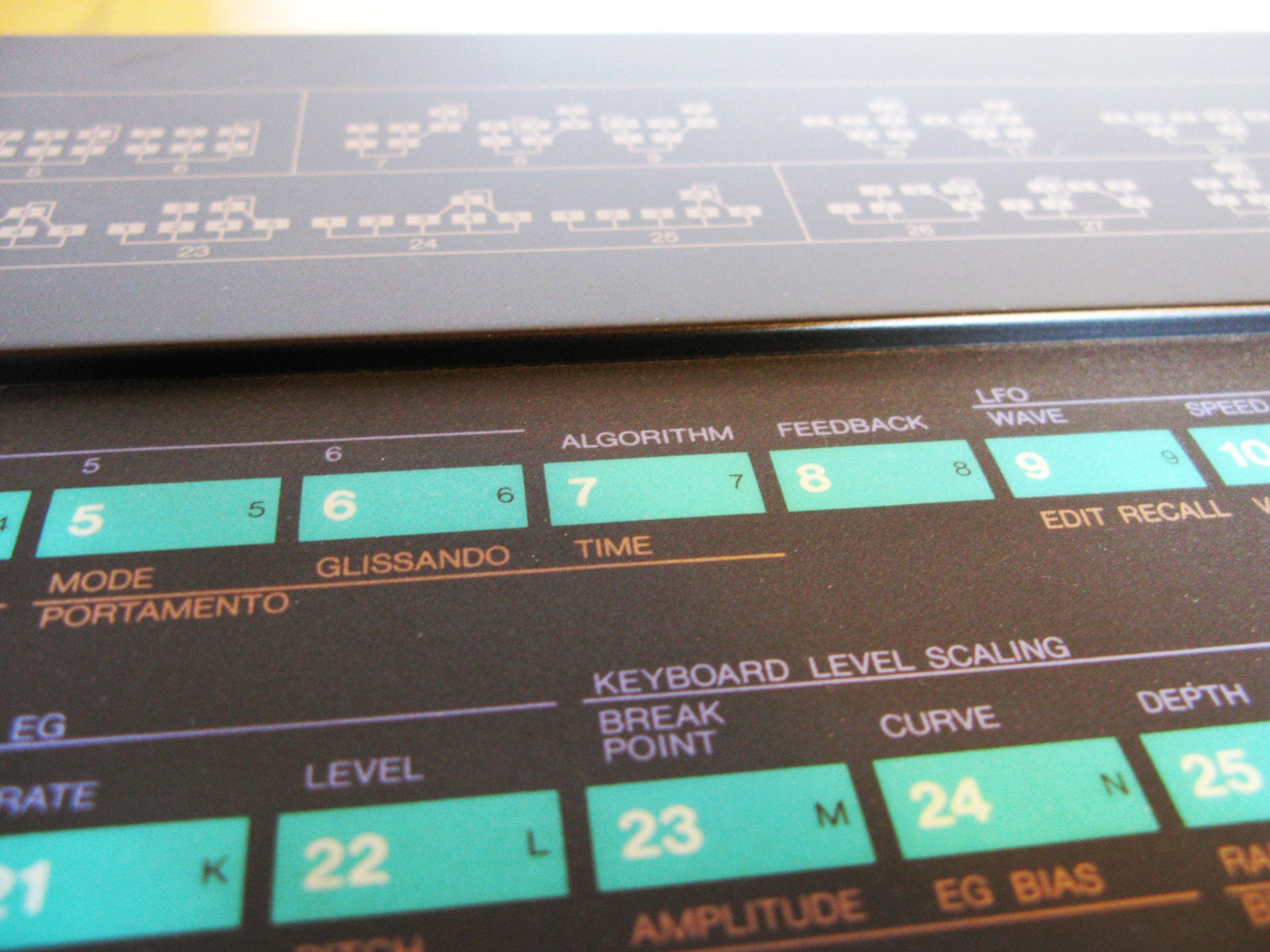 Yamaha DX7, a digital synth from early 80's.